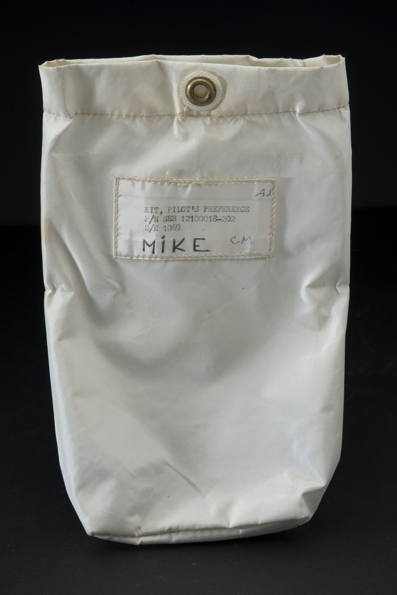 PPK di Micheal Collins